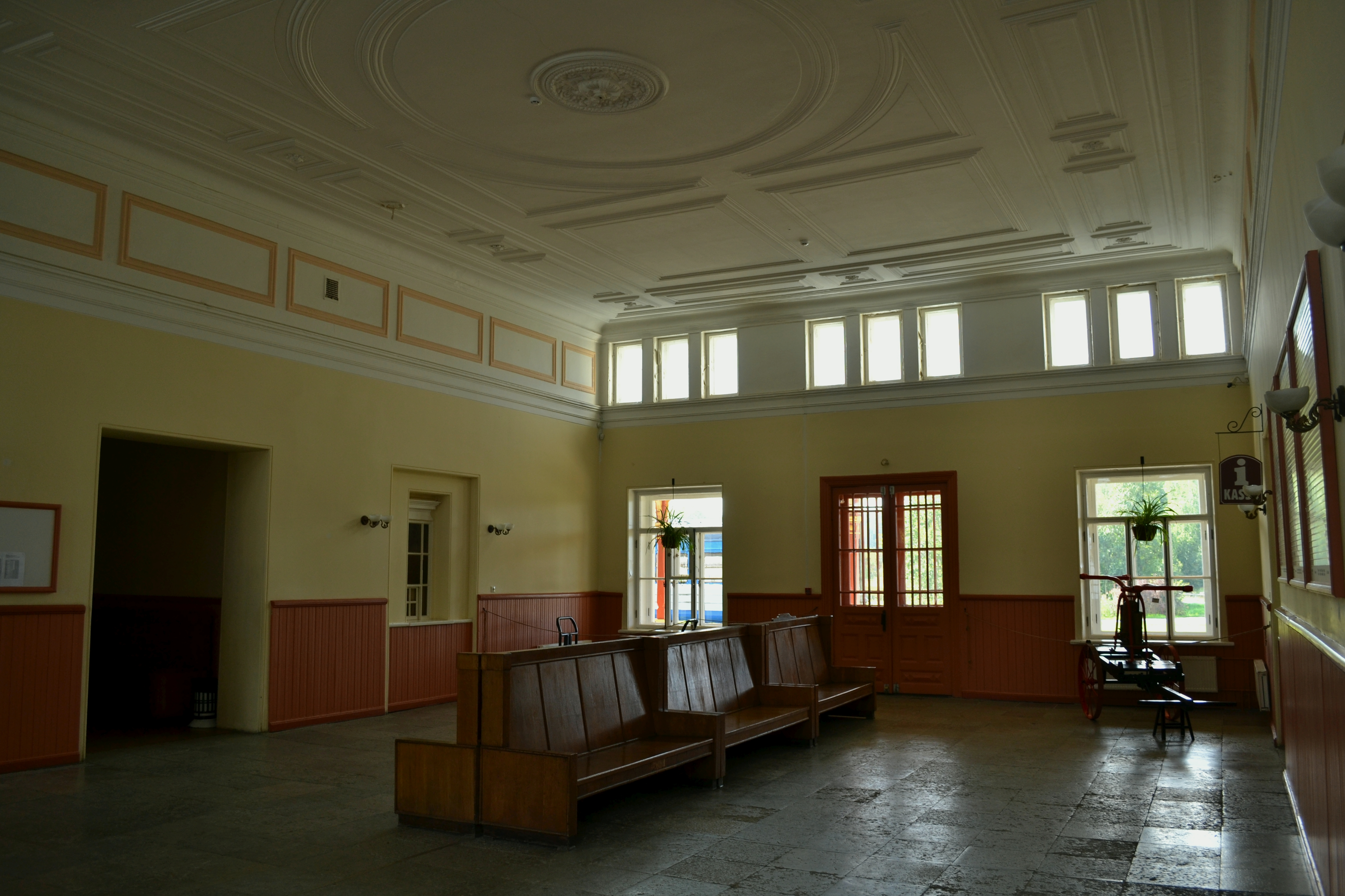 Haapsalu raudteejaama hoone perroonidega